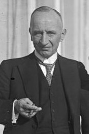 Title: Reichsverkehrsminister mit blindem Passagier People in the image: Guérard, Theodor von Dr.: Reichsjustizminister, Reichsverkehrsminister, Zentrum, Deutschland (GND 129918598) Factual corrections and alternative descriptions are encouraged separately from the original description. Additionally errors can be reported at this page to inform the Bundesarchiv. Original historic description: Die glückliche Landung des "Graf Zeppelin" nach seiner großen Amerikafahrt in Friedrichshafen a/Bodensee! Aufnahmen von unserm nach dort entsandten Sonder-Bild-Berichterstatter! Der blinden Passagiers, Clarence Terhune, welchem es gelang, als erster blinder Passagier den Ozean zu überfliegen, mit dem Reichsverkehrminister Guerard nach seiner Freilassung auf dem Balkon des Kurgarten-Hotels in Friedrichshafen am Bodensee.